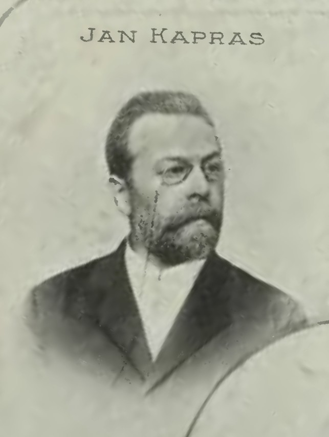 Portrét - Jan Nepomuk Kapras (1847-1931), Český pedagog.